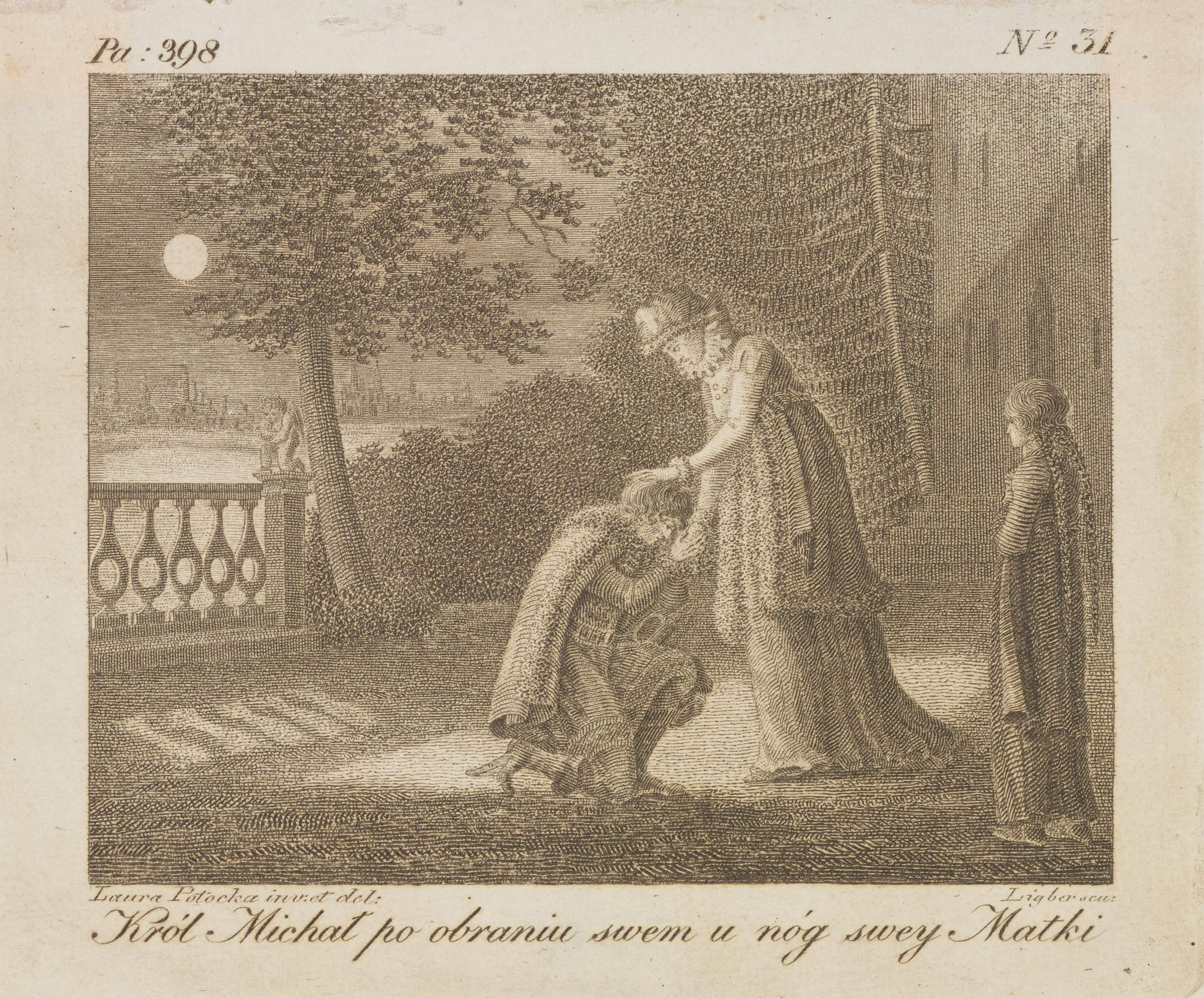 Laura Potocka (autorka wzoru), Król Michał po obraniu swem u nóg swej matki, przed 1814, miedzioryt, ryt. Jan Ligber, ilustracja do dzieła „Śpiewy historyczne” Juliana Ursyna Niemcewicza, Biblioteka Narodowa